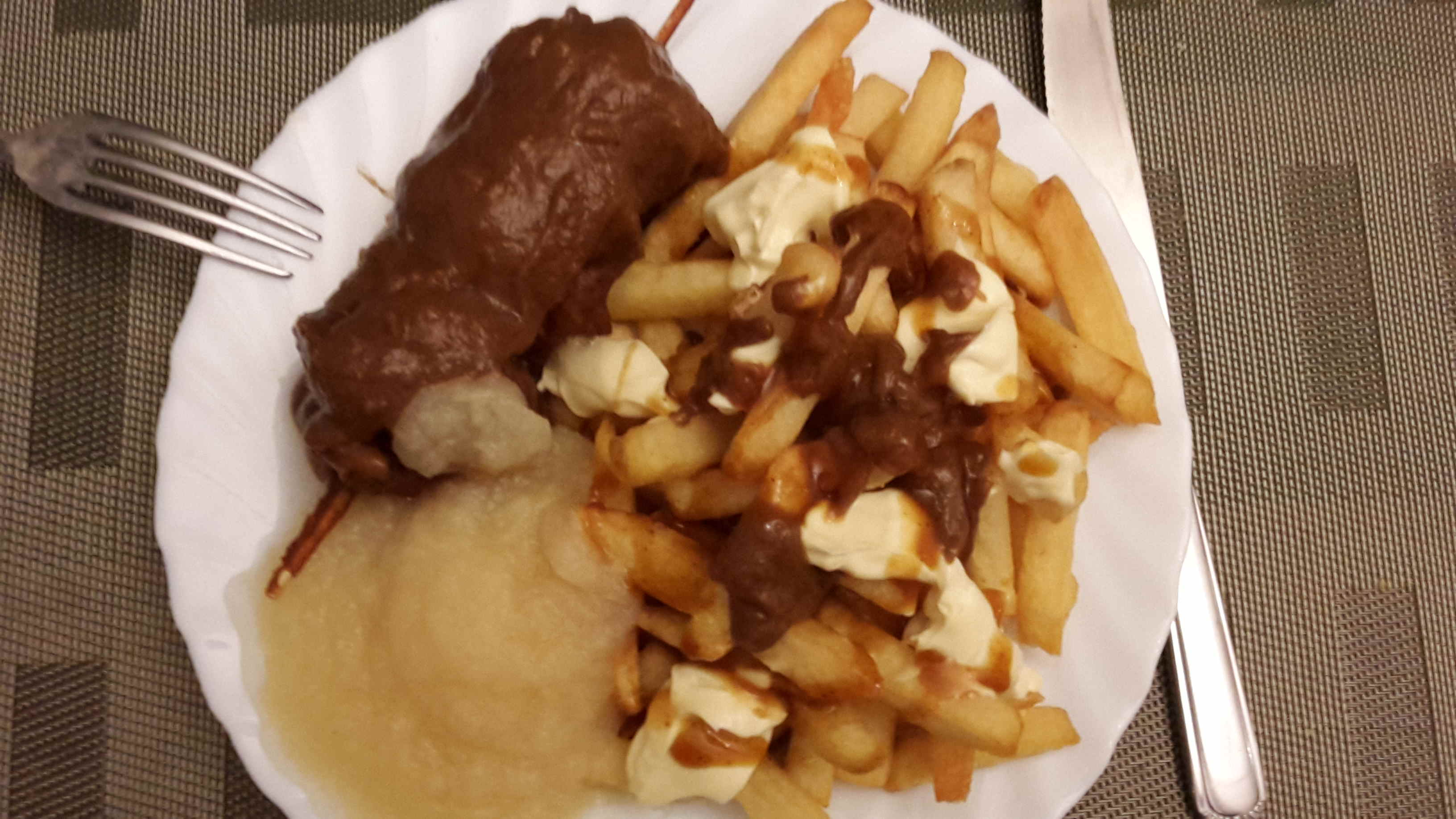 Berehap